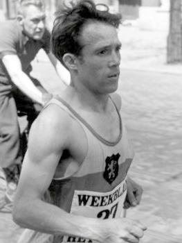 Marathon georganiseerd door "Het Leven". De winnaar van de marathon in 2 uur 46 minuten en 14 seconden de Belg Meskens alleen onderweg, Rotterdam 22 mei 1938.